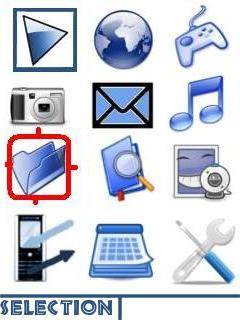 Simulation du menu d'un K800i custom par des icônes libres